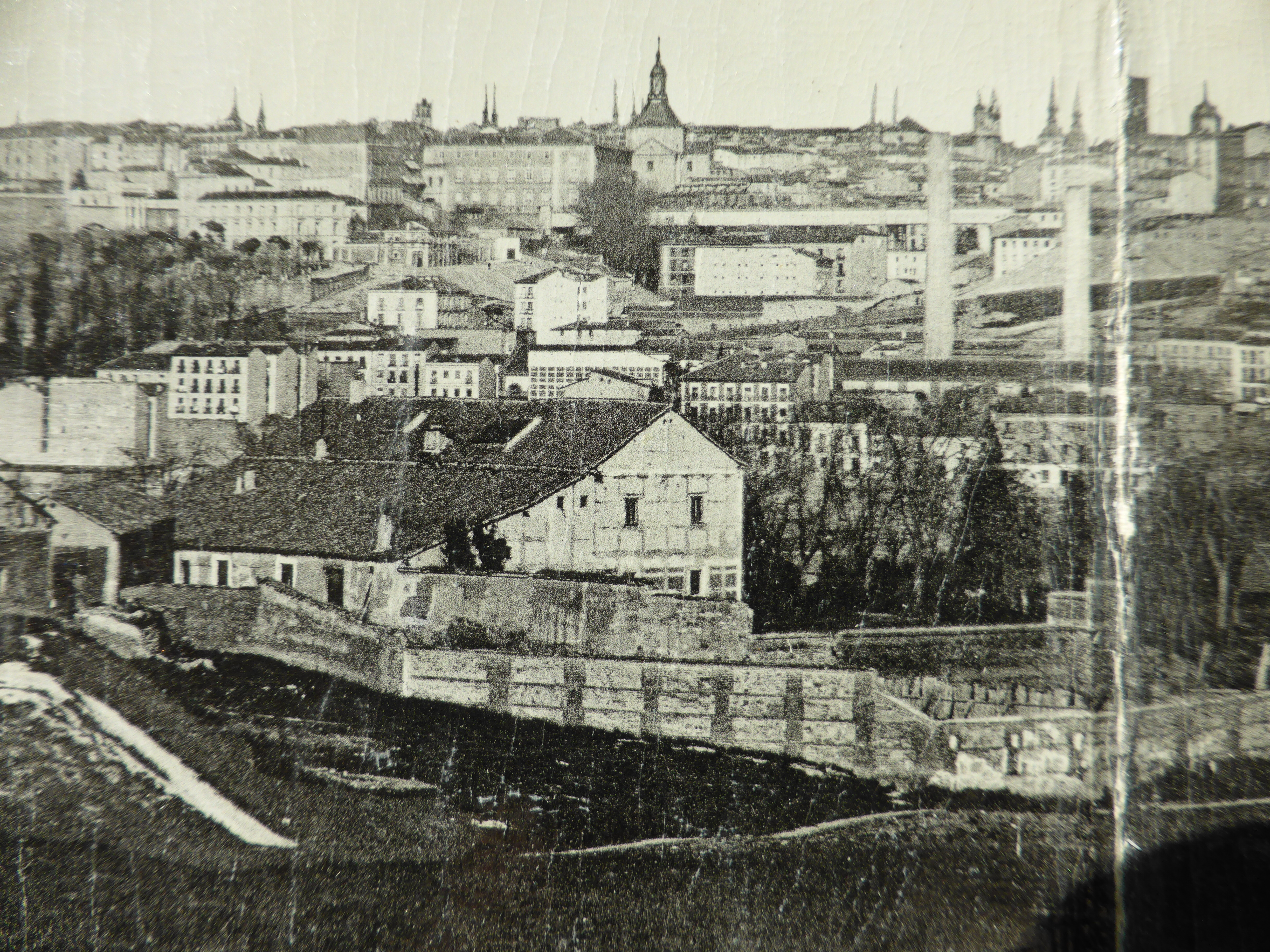 Reproducción de una tarjeta postal antigua de Madrid (España). Es un detalle de una panorámica en 3 partes, con el título "200. Vista General de MADRID". Impresa en fototipia hacia el año 1907, dos años antes del derribo de la fachada principal de la casa-palacio de los sucesores de Goya, que aquí aparece vista desde atrás. El aspecto de la casa es muy similar al que aparece en la pintura "La Quinta de Goya" de Aureliano de Beruete, año 1907, exhibida en el Museo del Prado. A comienzos del siglo XX, la antigua casa de Goya estaba completamente reformada e incompleta, pues unos 30 años antes se había derribado el ala de las Pinturas Negras, tras su extracción de los muros. Tuvieron que perforar las paredes para llevarse las pinturas, y eso ocasionó la ruina de la parte faltante de la casa. Esta tarjeta postal es de mi colección particular, adquirida en Delcampe. Hay otros ejemplares en otras colecciones particulares. La postal fue editada por el monogramista "TG" (o "GT"), de Madrid, que parece corresponder a la madrileña Casa Thomas, dirigida por Tomás Gianello, en calle Sevilla número 3.